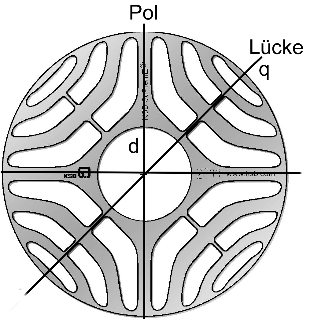 Rotor Blechschnitt SynRM KSB/REEL basierend auf Prof. Vagati, Turin